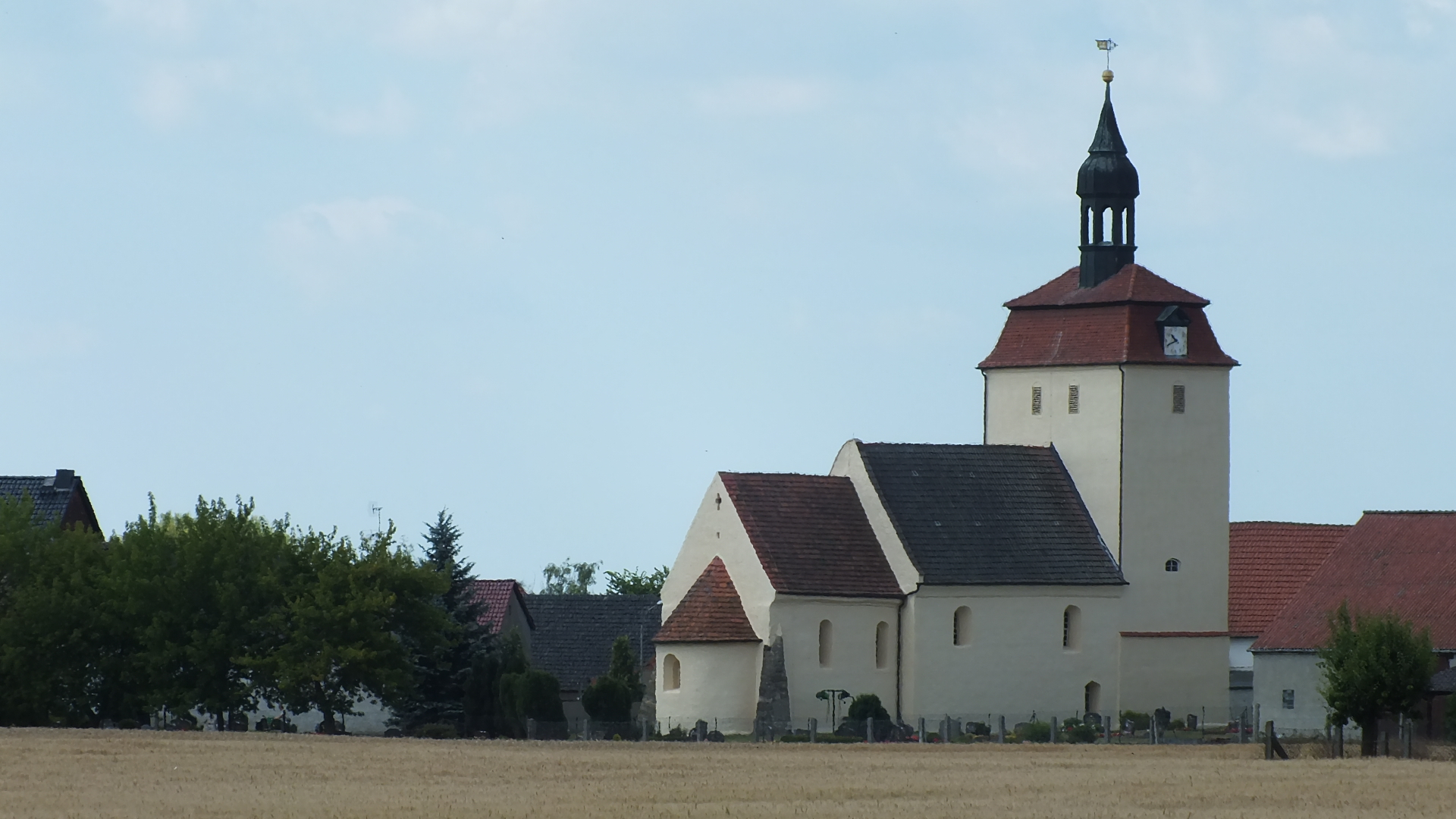 denkmalgeschützte Kirche in Lebien